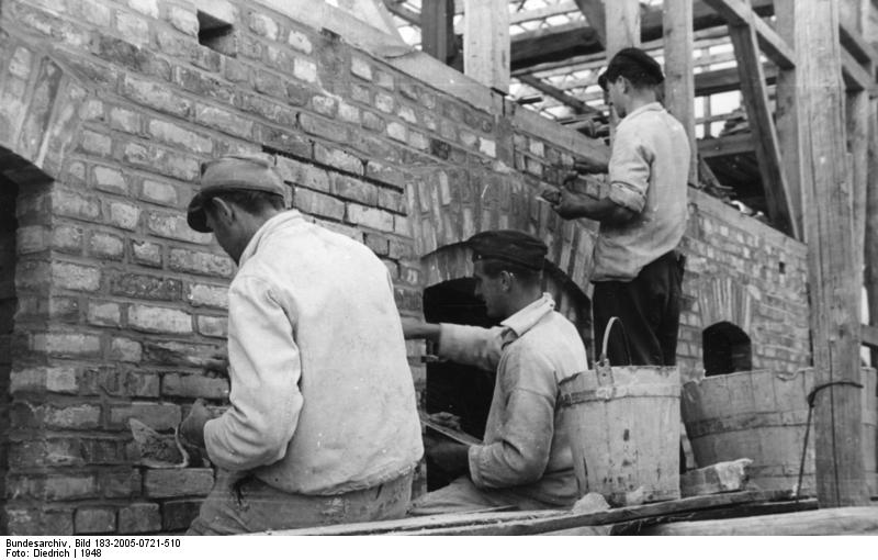 Vorpommern, Bau von Neusiedlerhäusern Hausbau. 1948 Am Bau von Neusiedlerhäusern in Vorpommern. Aufn.: Illus-Diedrich 1964-48 [Vorpommern.- Maurer beim Verfugen einer Hauswand]